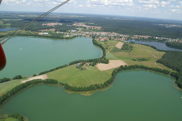 Łupstych